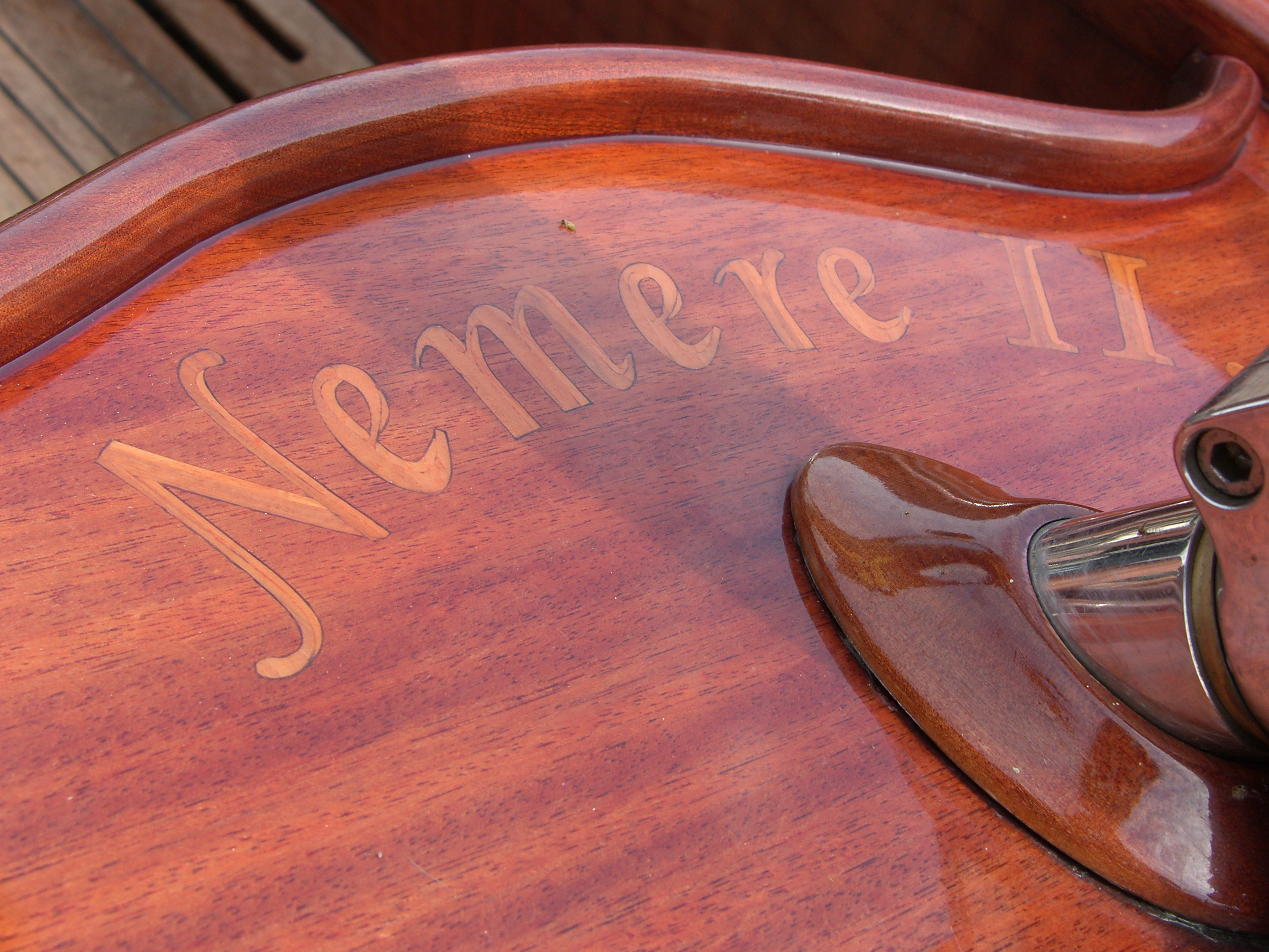 A Nemere II. egy 75-ös cirkáló (Schärenkreutzer), a Balaton legendás zászlóshajója. Az 1944-ben épített Nemere vitorlás hétszer állt rajthoz a balatoni Kékszalagon, s 5 győzelmet aratott. 1955-ös 10 óra 40 perces rekordját 57 éven át nem tudták túlszárnyalni.